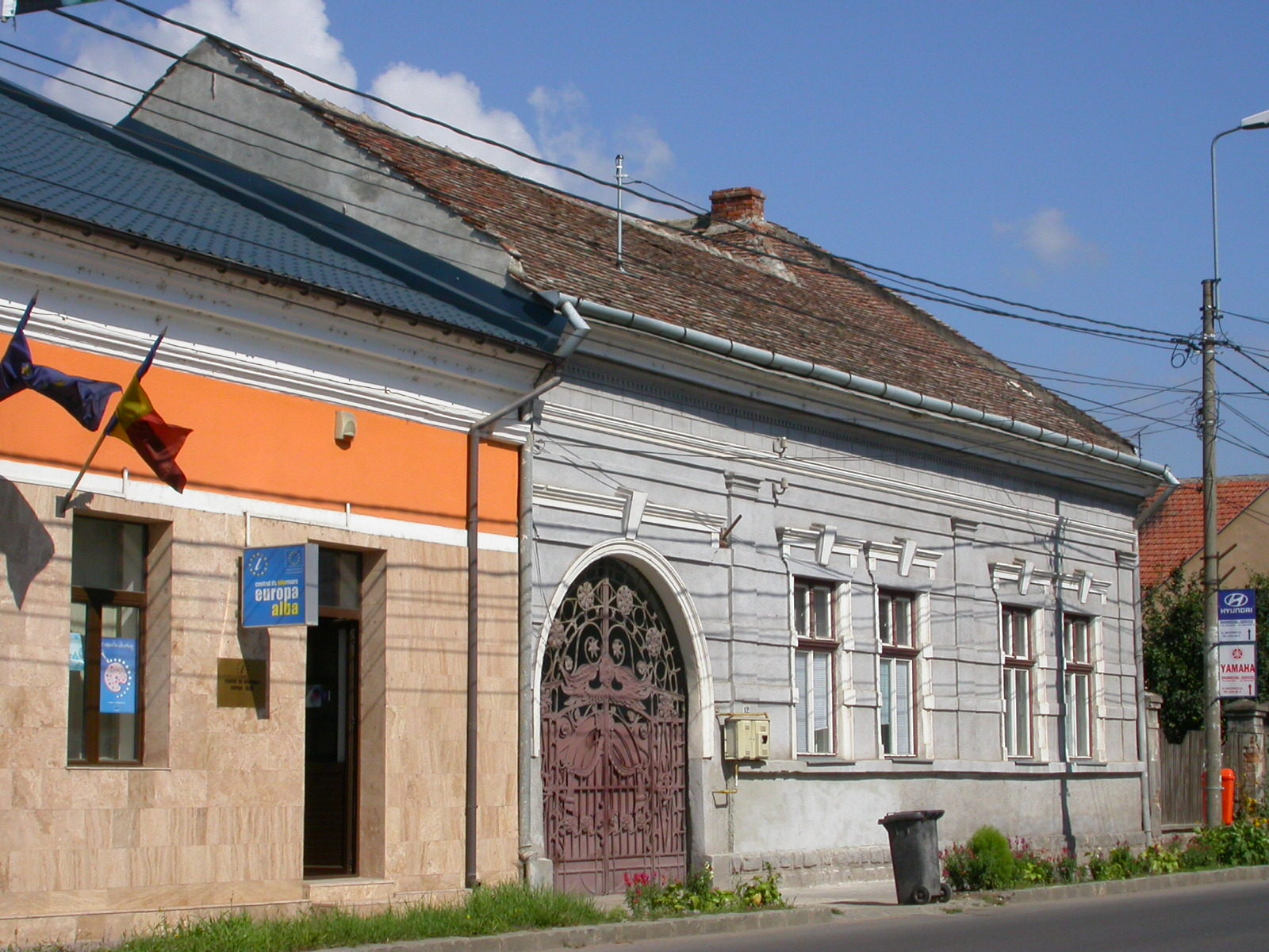 Casă, sf. sec. XIX